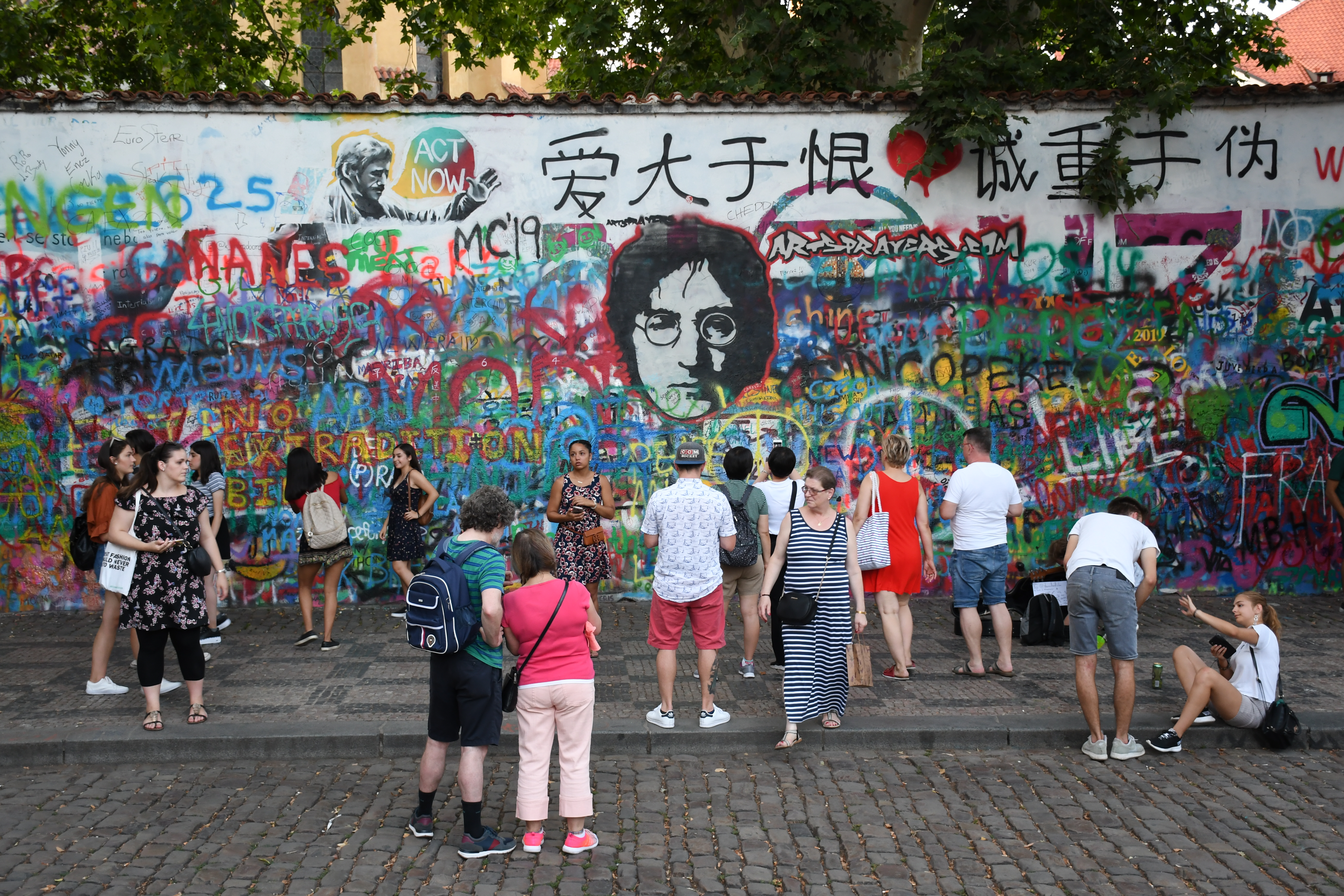 Turisté u Lennonovy zdi v Praze, v pozadí portrét Johna Lennona